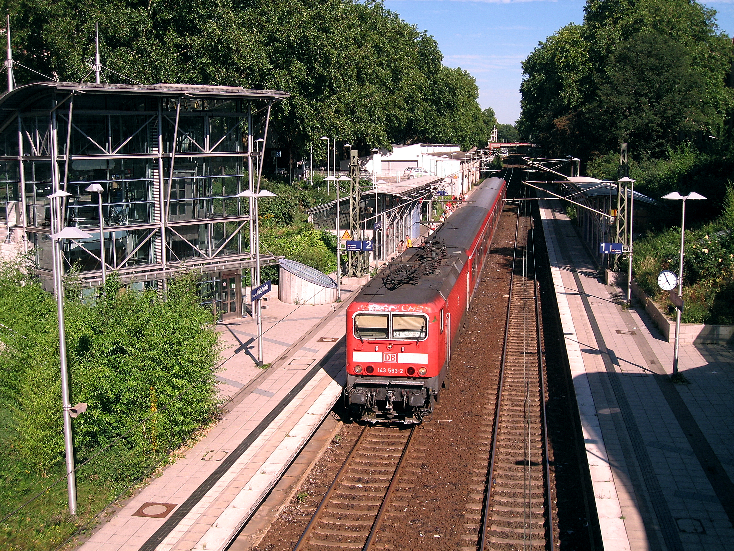 Dortmund Möllerbrücke im Kreuzviertel, S-4, Haltepunkt Möllerbrücke